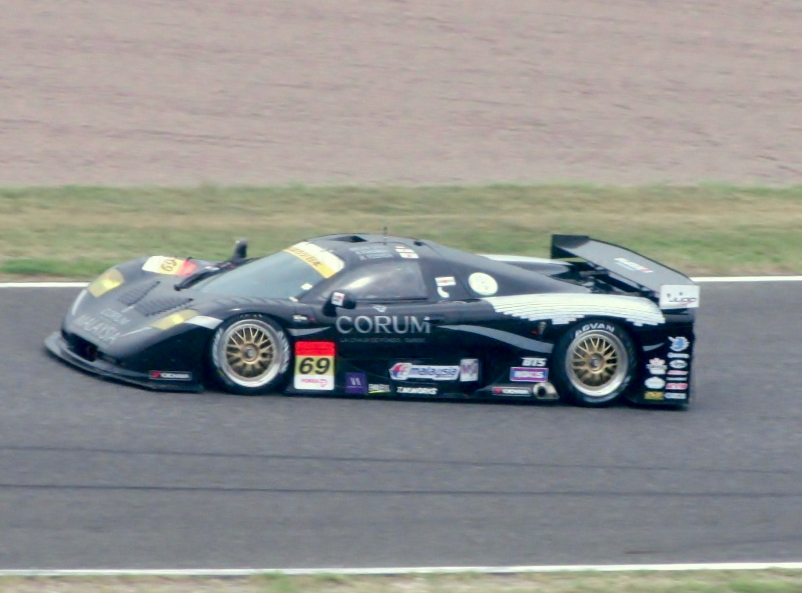 第40回インターナショナルポッカGTサマースペシャルに於けるサンダーアジアMT900Mを撮影。みんカラにもアップロードされている。